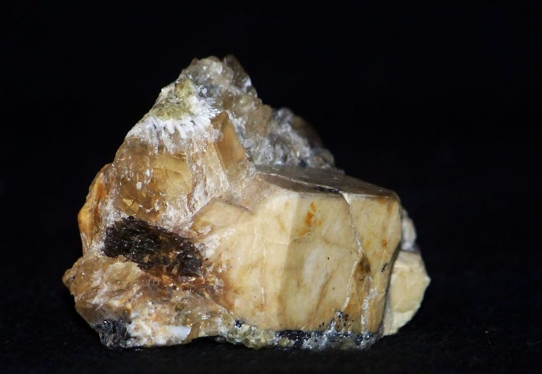 Mineralizacja pegmatytowa. Na zdjęciu widoczny kryształ ortoklazu, oraz kalcyt, klinochlor, fluoryt, zoisyt. kamieniołom Zimnik, okolice Jeleniej Góry, Dolny Sląsk.